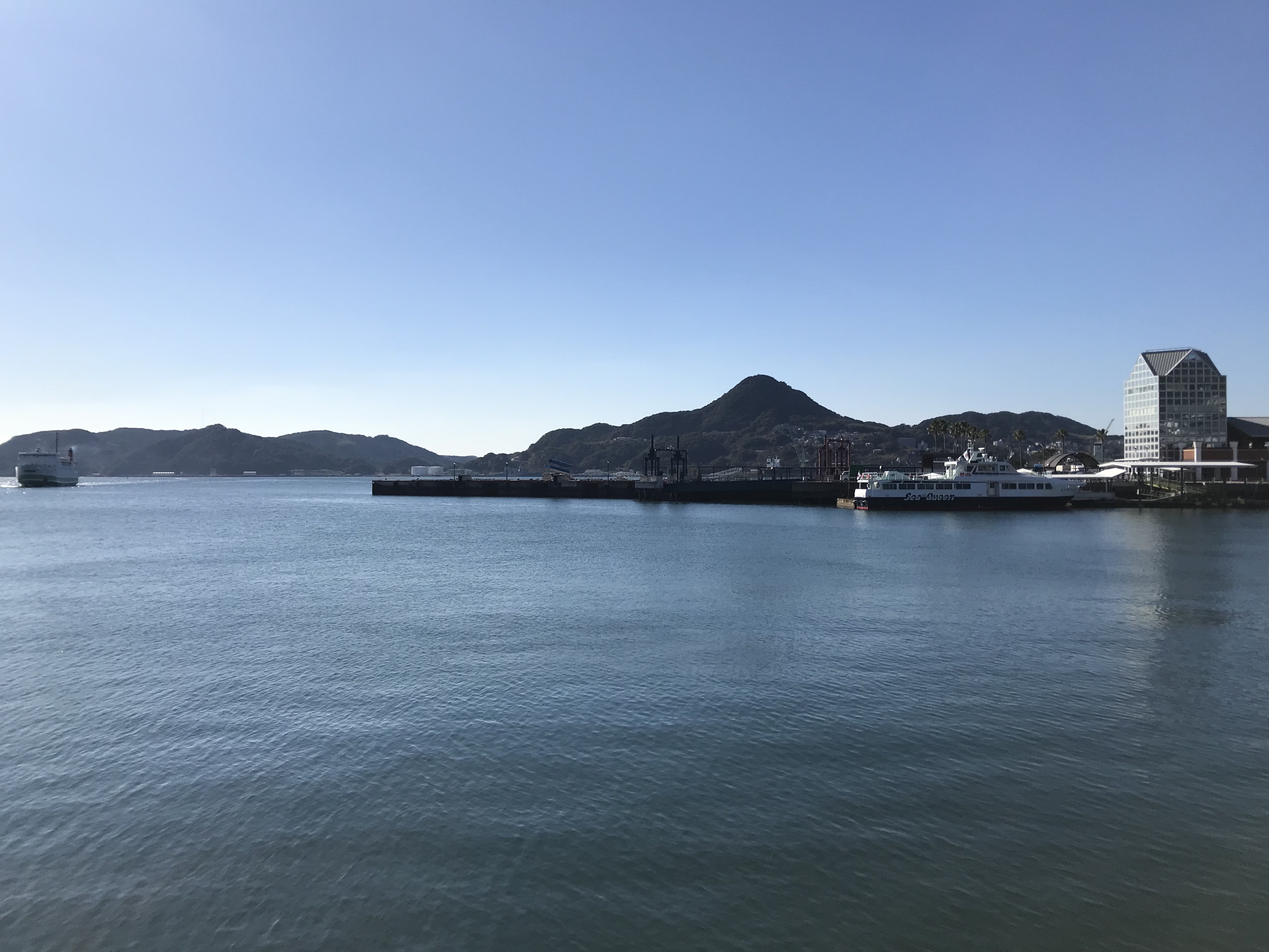 佐世保港(俵ヶ浦半島方面)